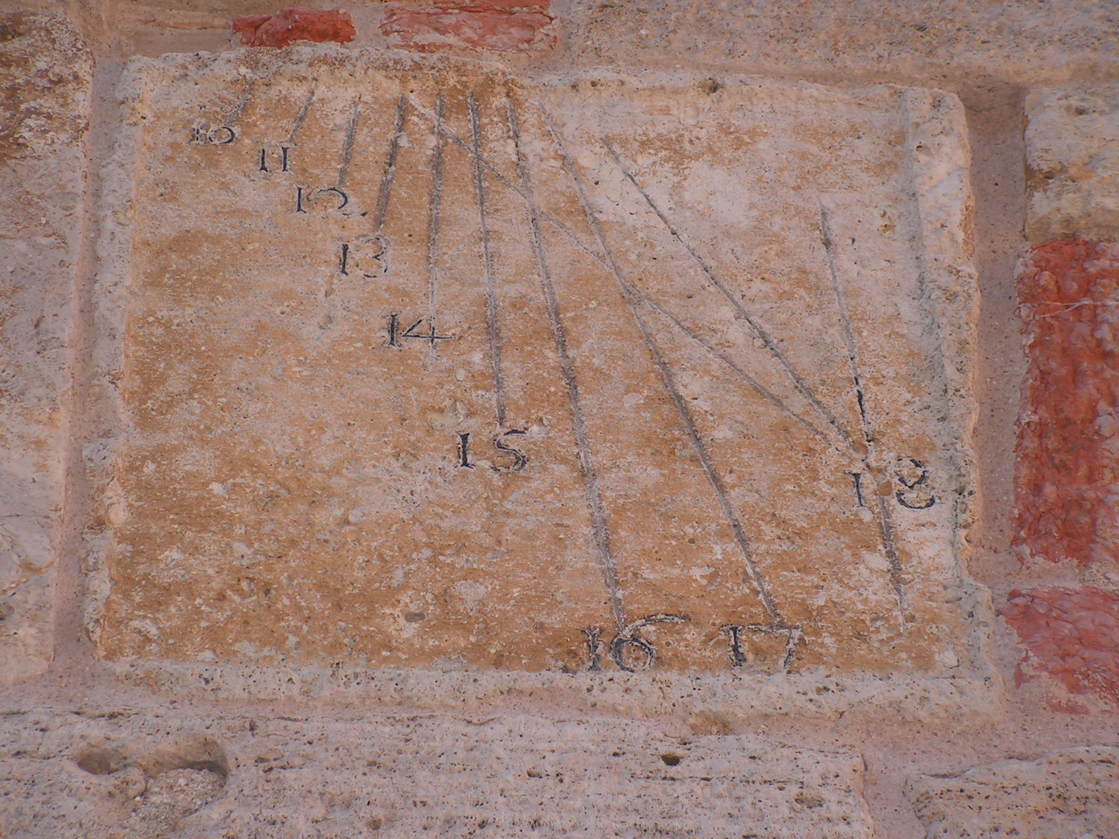 R.Passagrilli Meridiana incastonata nella Torre dodecadonale